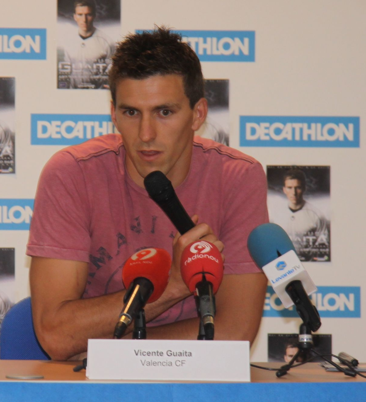 El porter del València CF, Vicente Guaita, a un acte al seu poble, Torrent.